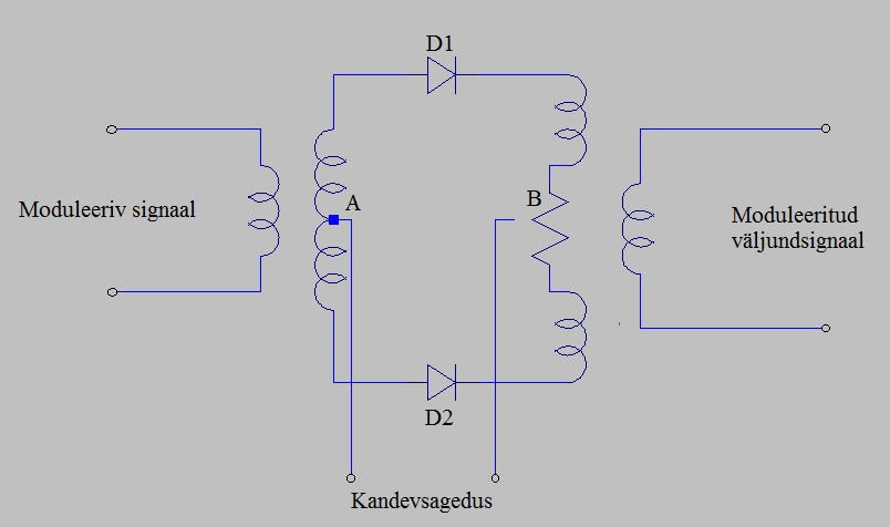 Dioodmodulaator